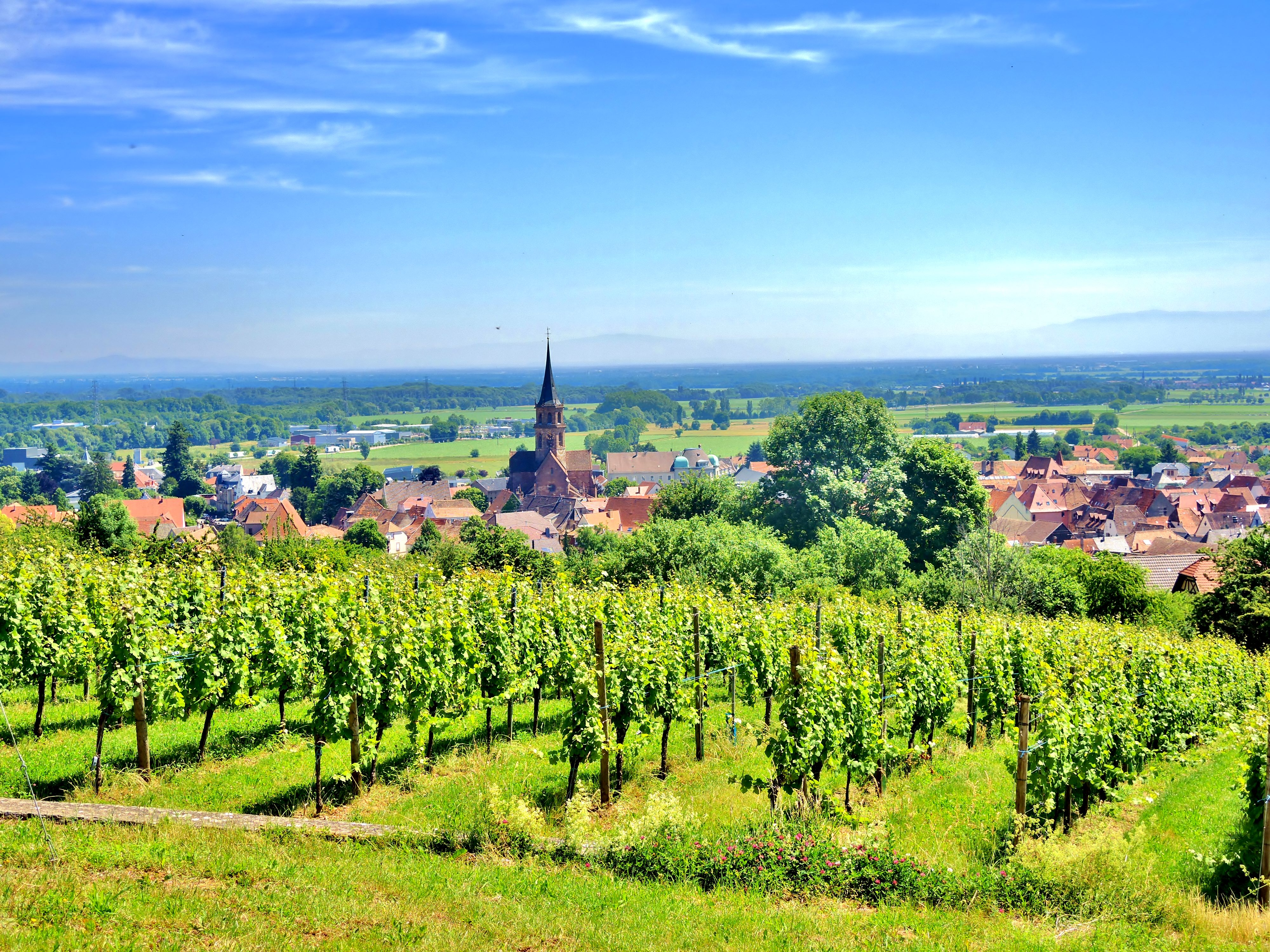 ¨Panorama sur Soultz-Haut-Rhin